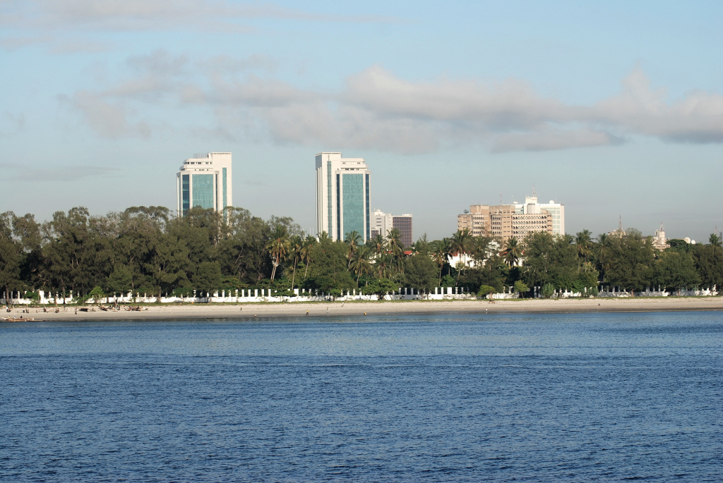 Dar es Salaam